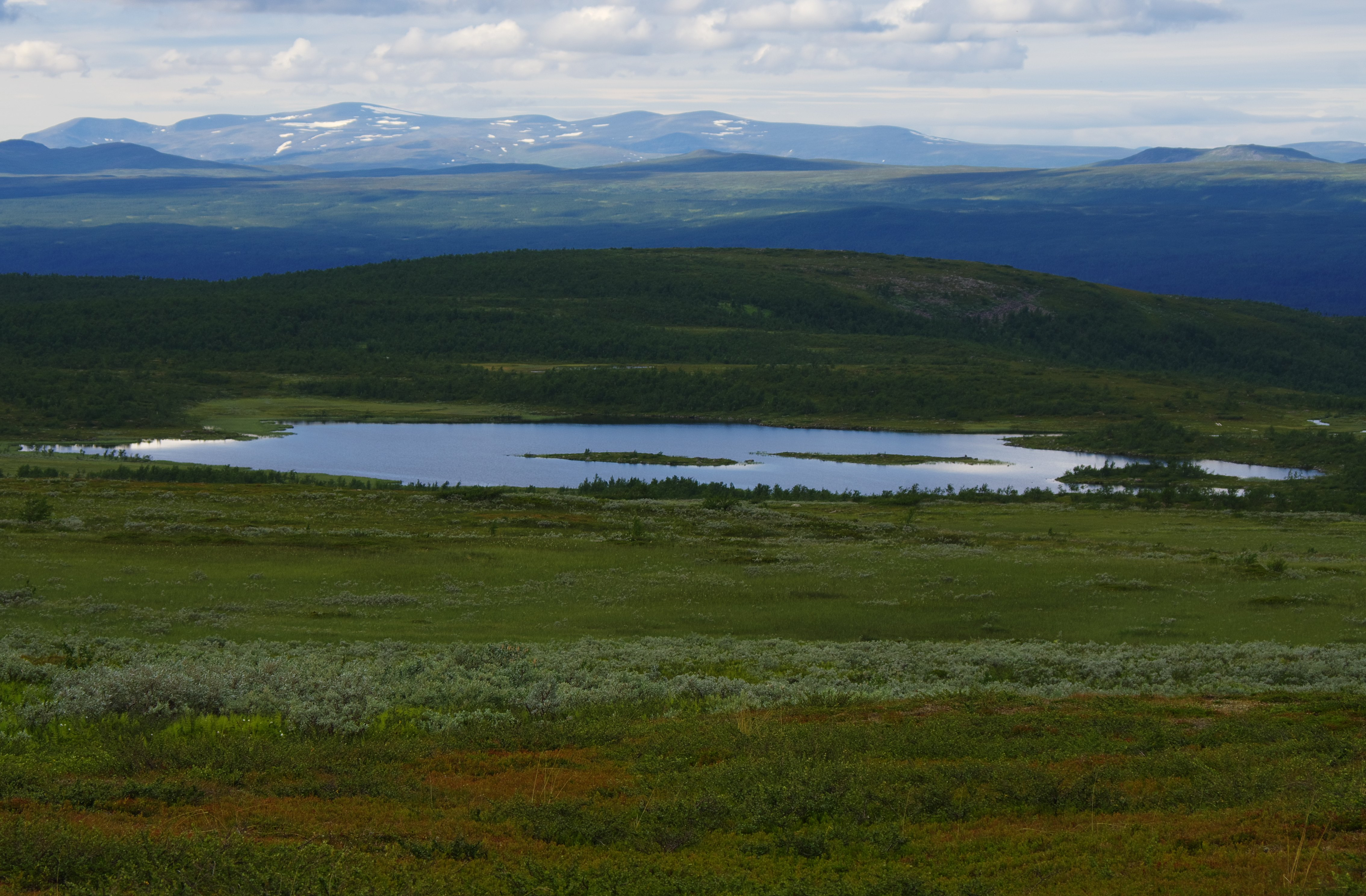 Sjön Tjatsaljauratj (äldre stavning) alternativt Tjántsaljáurátj (nyare stavning 3 km sydväst om Jäkkvik i Arjeplogs kommun i Lappland i Sverige.